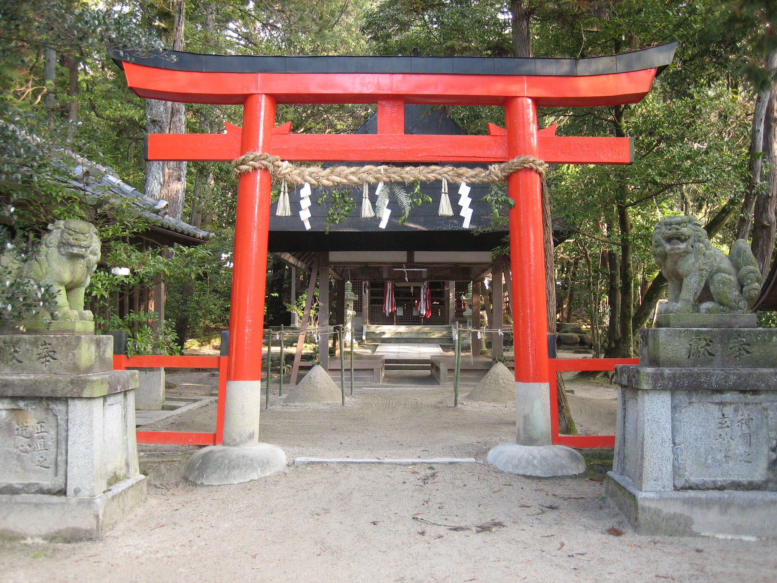 貴船神社を京都市北区上賀茂西後藤町から撮影